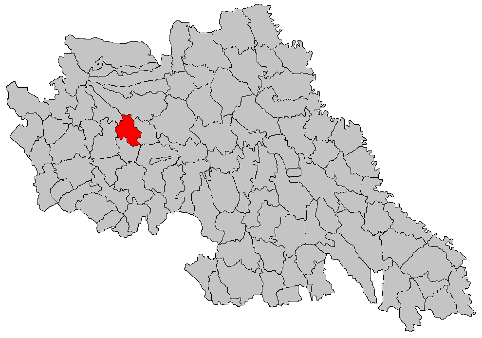 Categorie:Hărţi ale judeţului Iaşi